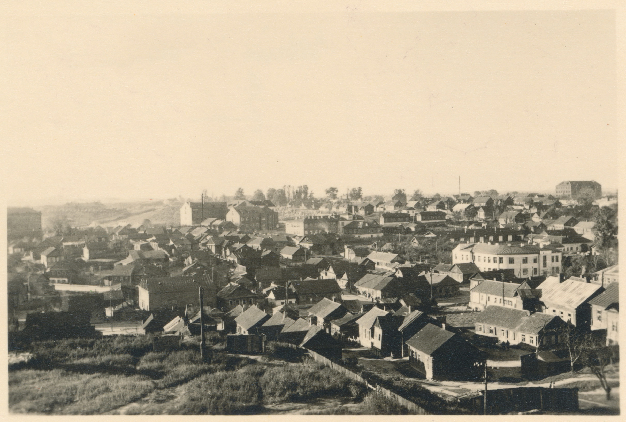 Беларуская (тарашкевіца): Менск (Miensk), шлях Каралеўскі (šlach Karaleŭski)